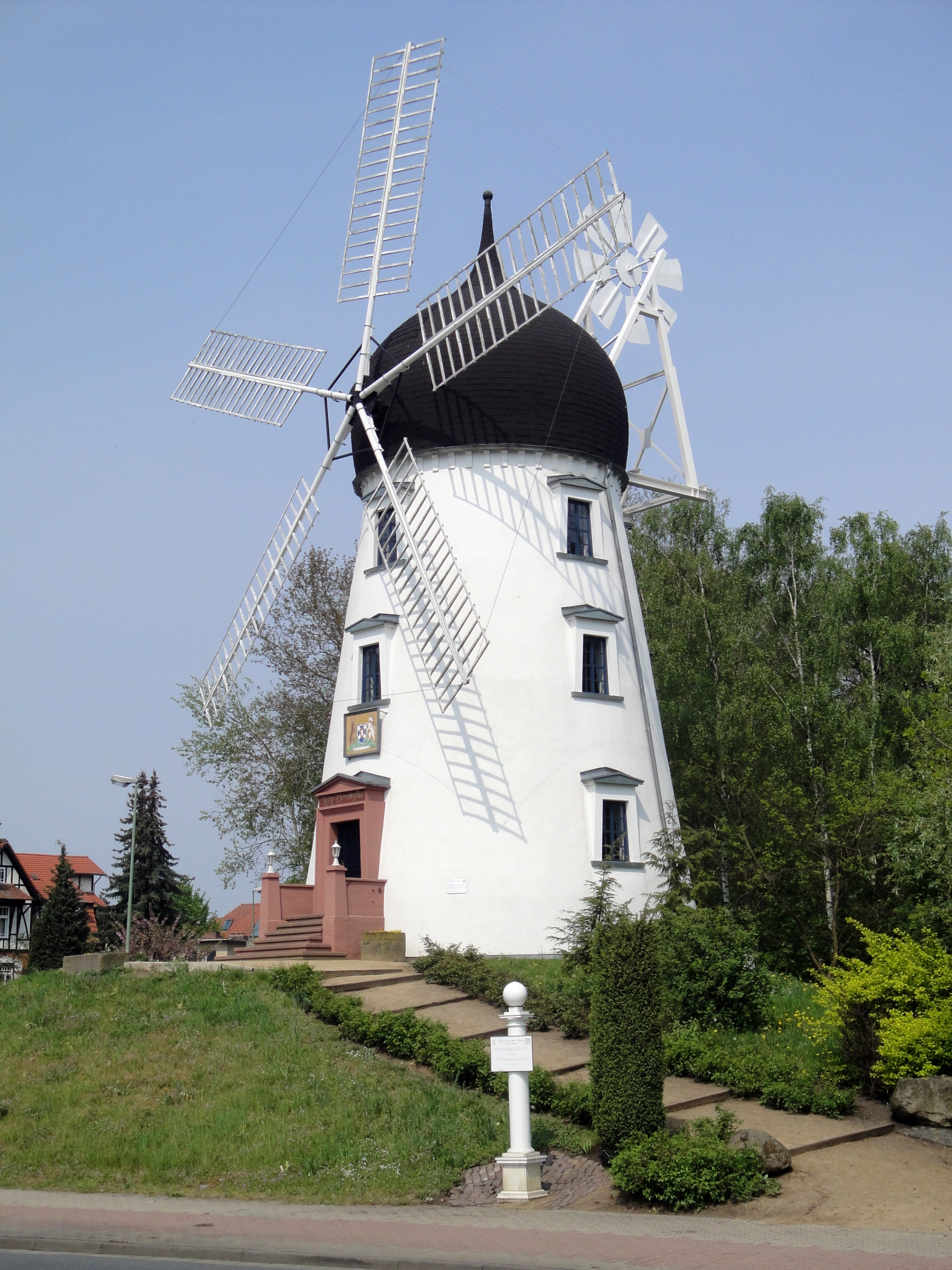 Windmühle „Lady Devorgilla“ in Gifhorn